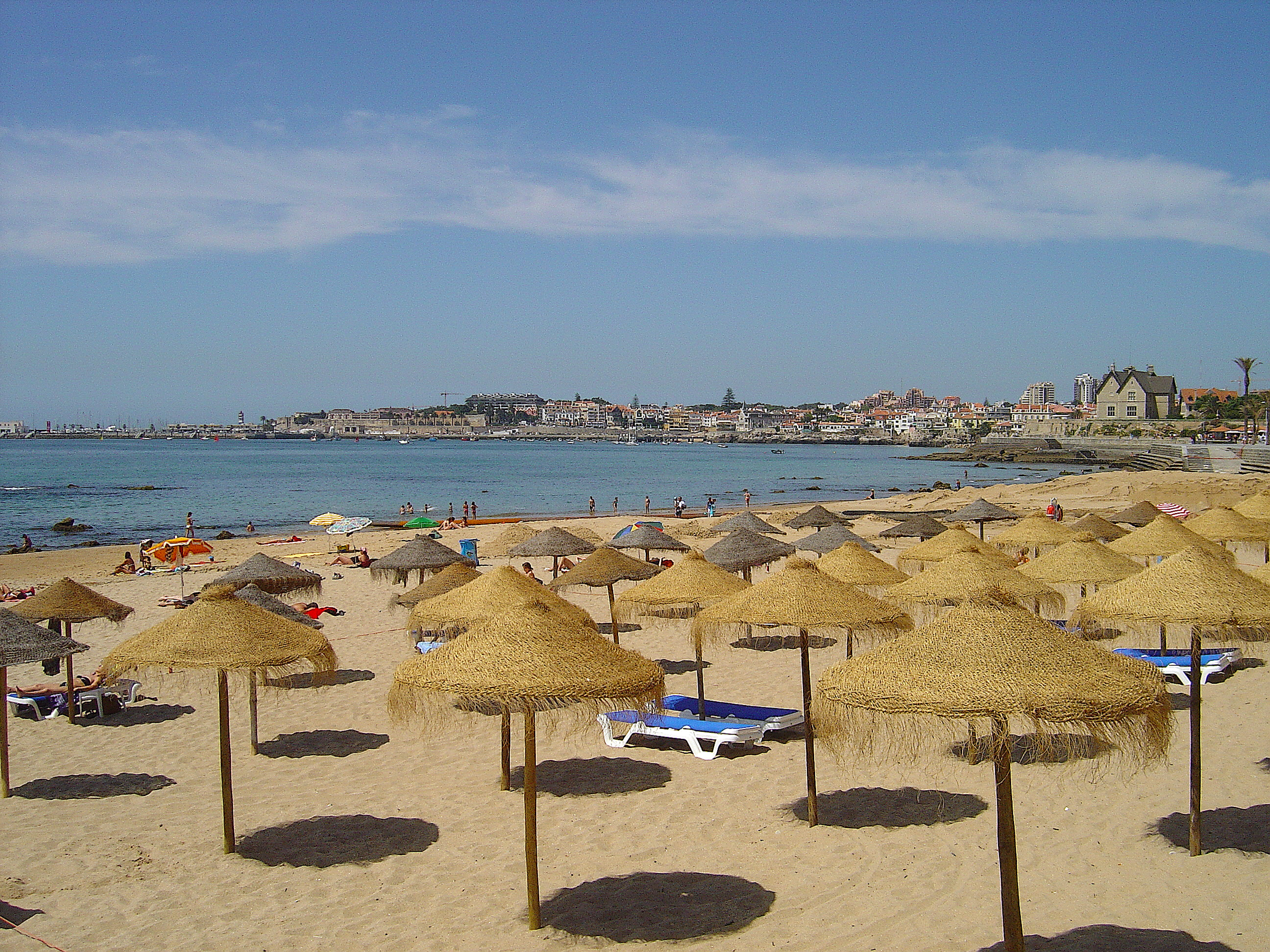 Praia das Moitas - Estoril (Portugal)